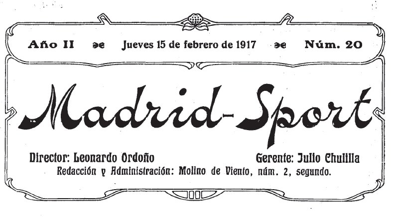 Madrid Sport - Director: L.Ordoño. Gerente: J. Chulilla Administracion: Molino de Viento, num. 2, segundo.